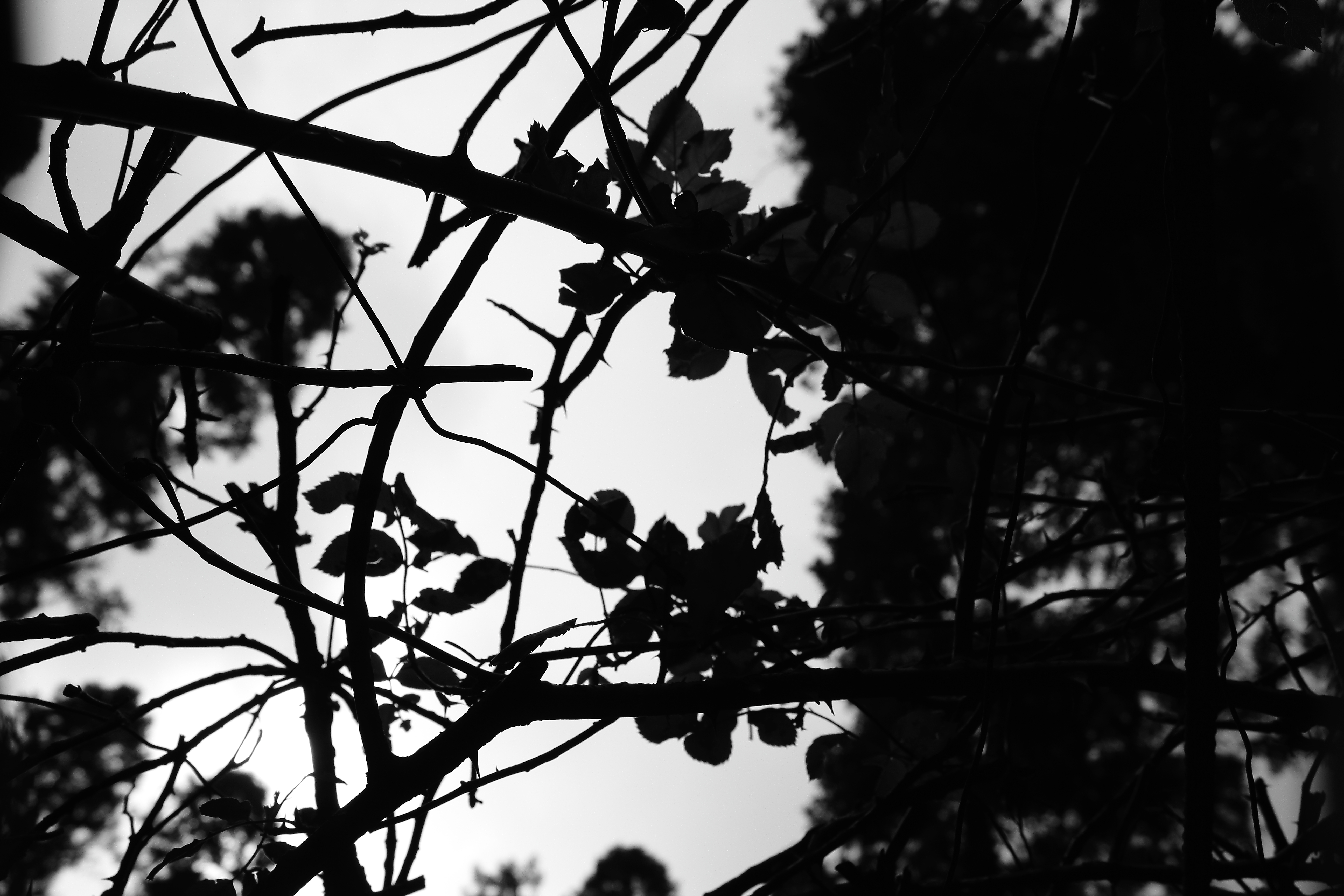 Sombras de ramas.